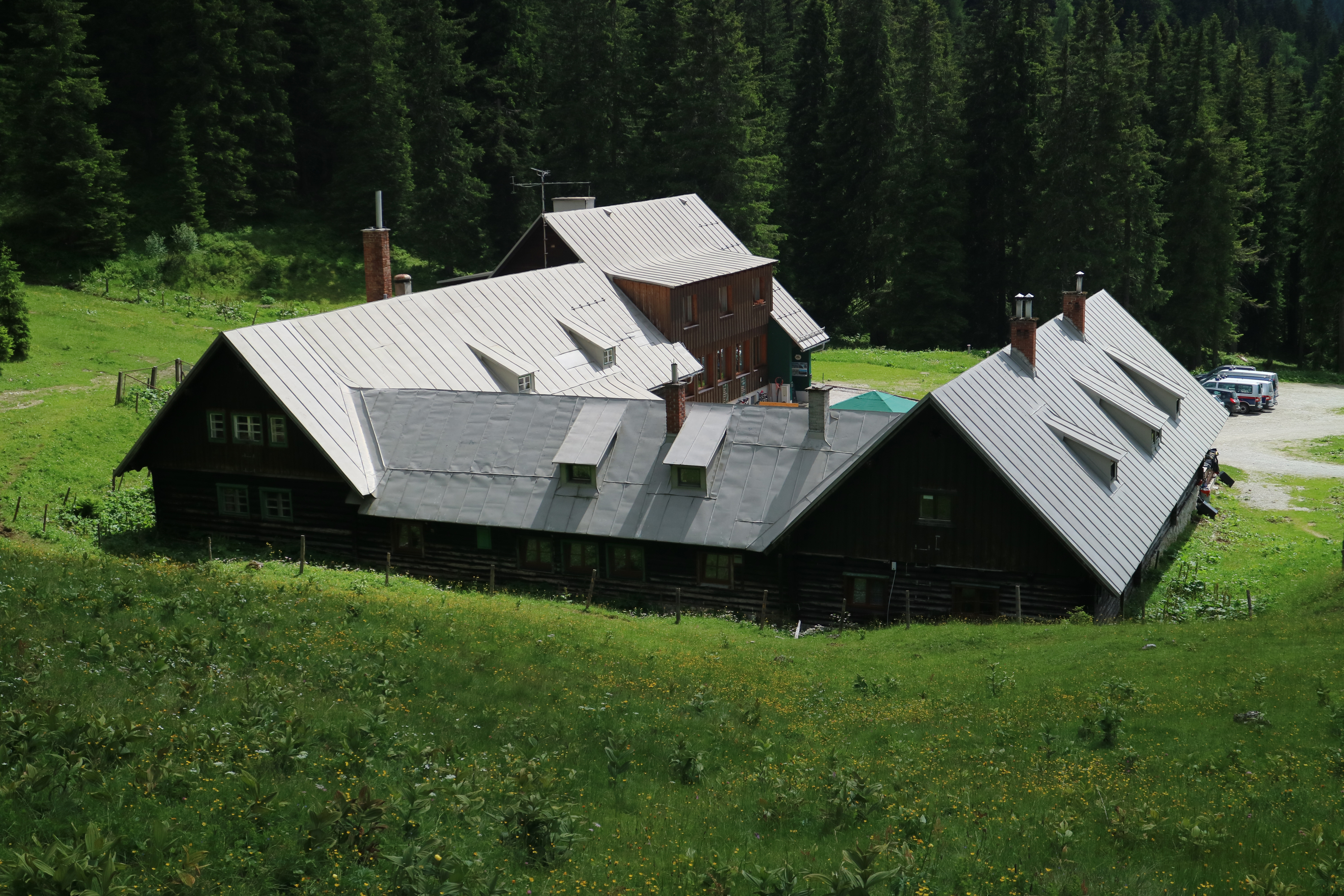 Oberst-Klinke-Hütte in den Ennstaler Alpen